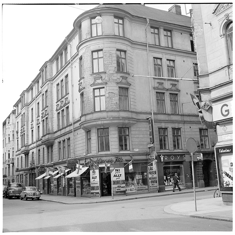 Broddmans Foto, hörnan Skeppargatan-Storgatan på Östermalm i Stockholm, 1962.